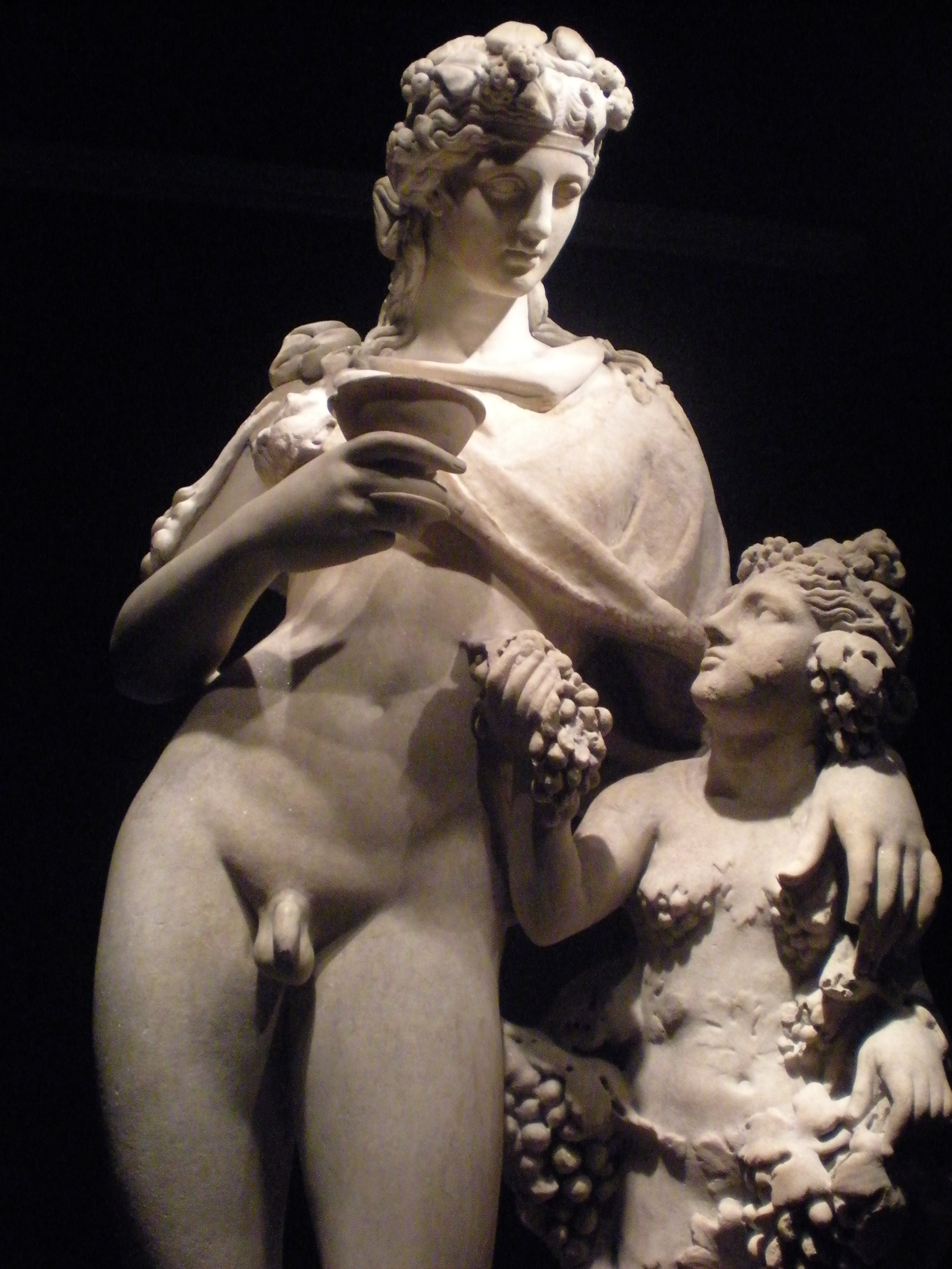 Estatua de mármol de Dionisio con una encarnación antropomorfa del vino, en la exposición La belleza del cuerpo, en el MARQ. Dinioso está representado como un joven afeminado que apoya el brazo izquierdo en el hombro de la encarnación del vino, como figura semihumana sobre la que crecen hojas y uvas. El cuerpo del dios del vino se modeló alargado y esbelto con suaves curvas femeninas, como formulismo tipológico de la época griega de la escultura tardía o «helenística». El brazo que sostiene la copa y otras pequeñas partes están restauradas. Época romana, aproximadamente del 150-200 d. C. Tal vez basada en un original griego del siglo II. a. C. Procedente de La Storta, Italia. Medidas: 1580 mm x 680 mm x 390 mm. GR 1805.0703.1 (Escultura 1636).